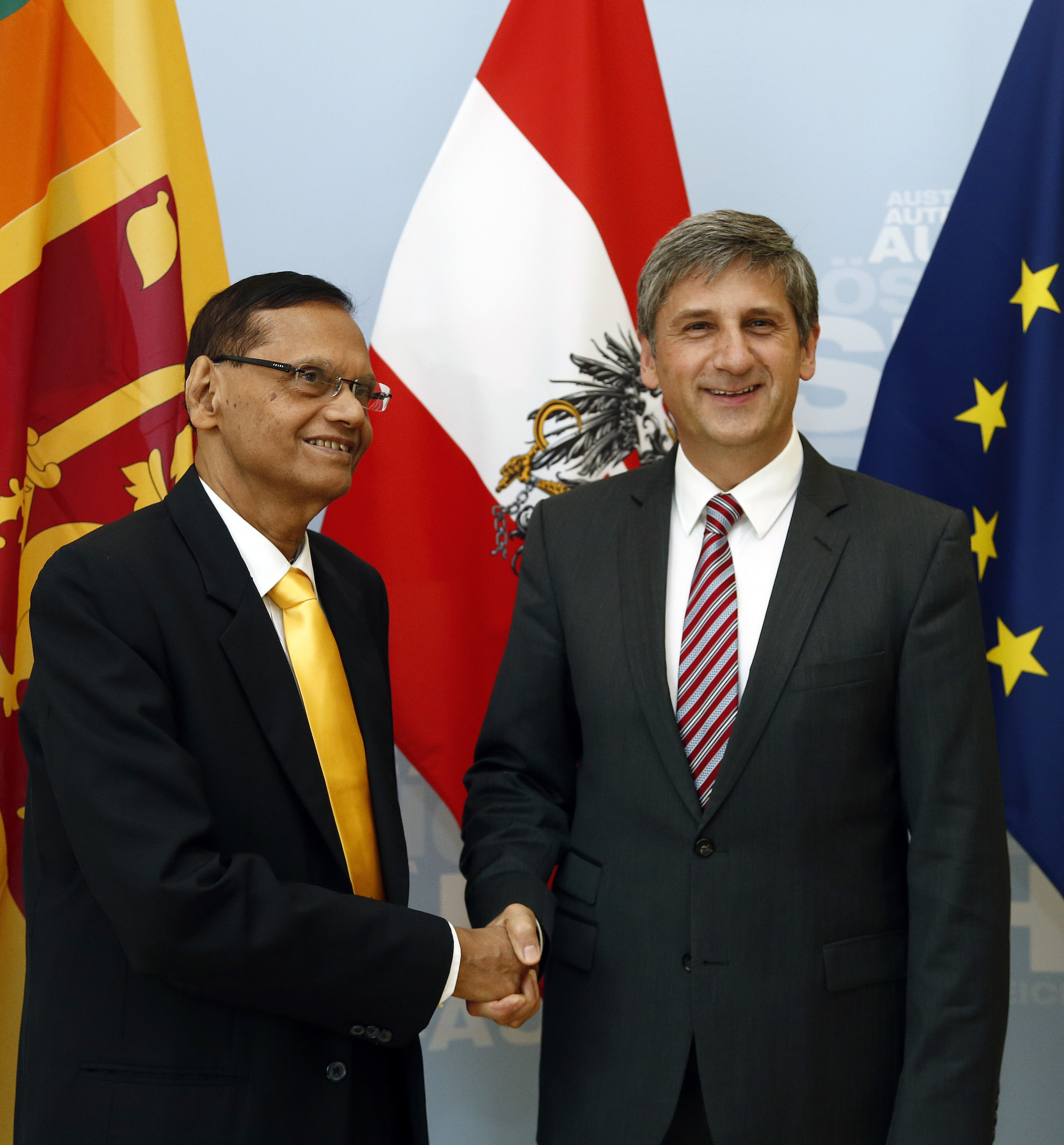 Vizekanzler und Außenminister Michael Spindelegger trifft den Außenminister von Sri Lanka, Prof. G.L. PEIRIS. Wien, 11.06.2013, Foto: Dragan Tatic